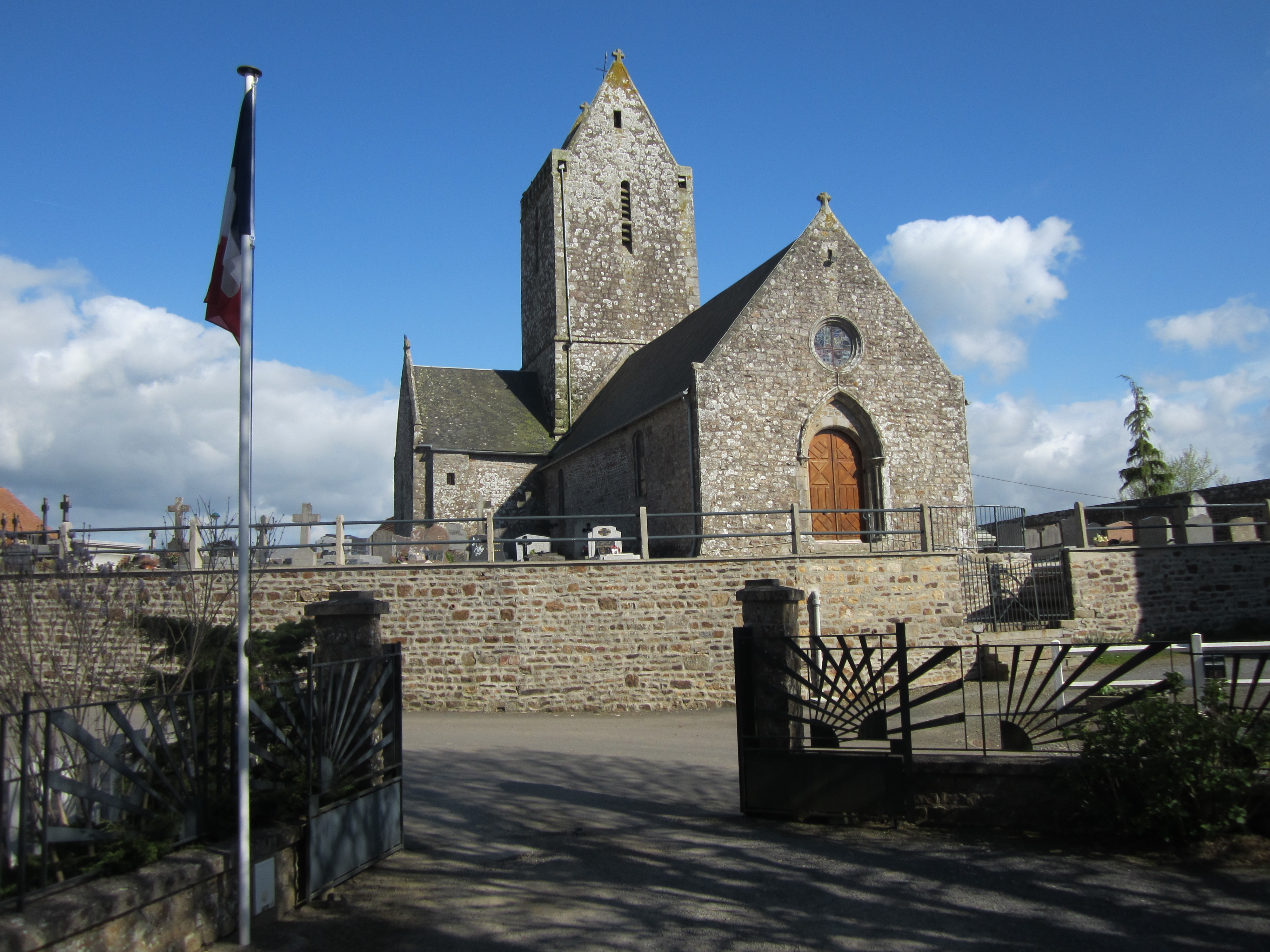 Montviron, Manche